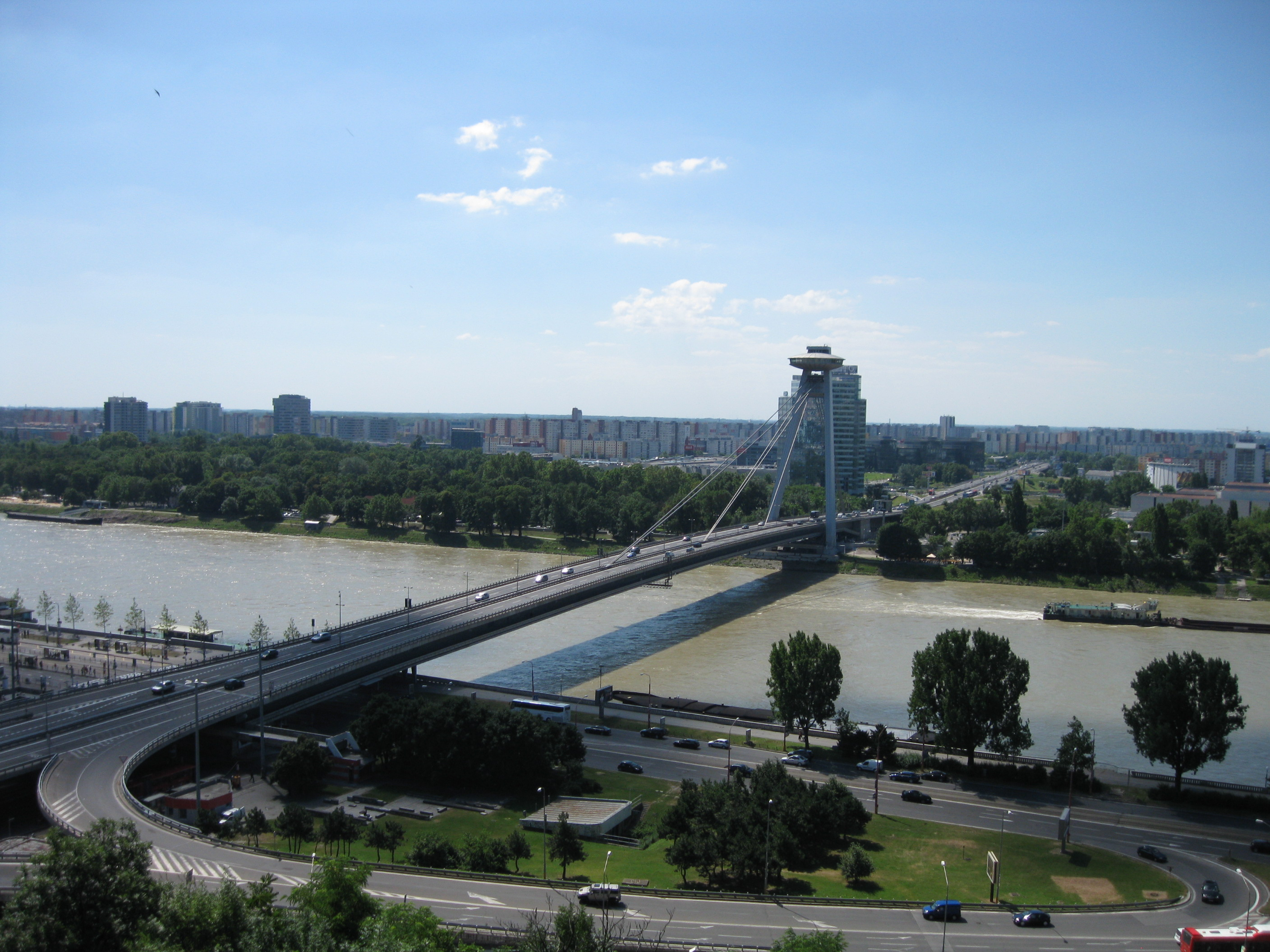 Die Neue Brücke in Bratislava